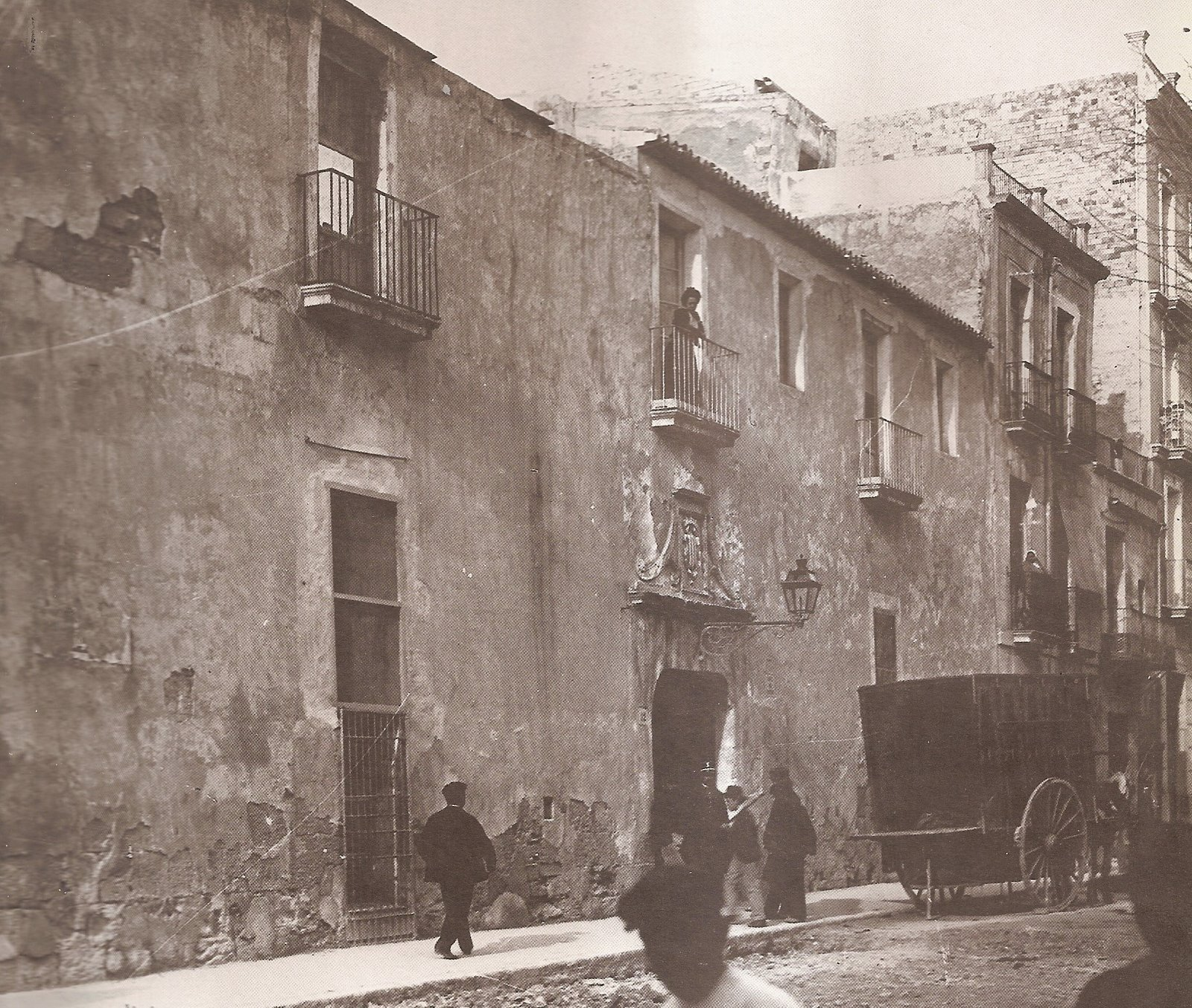 L'Alforí de la Sal d'Alacant, coneguda també com a Casa del Rei, fou un edifici de principis del s.XVI que es trobava situada a l'actual plaça Gabriel Miró. Tingué diversos usos, l'últim dels quals fou de presidiari. A la façana d'este edifici apareix l'escut foral d'Alacant amb les armes reials d'Aragó, amb la data de 1521.